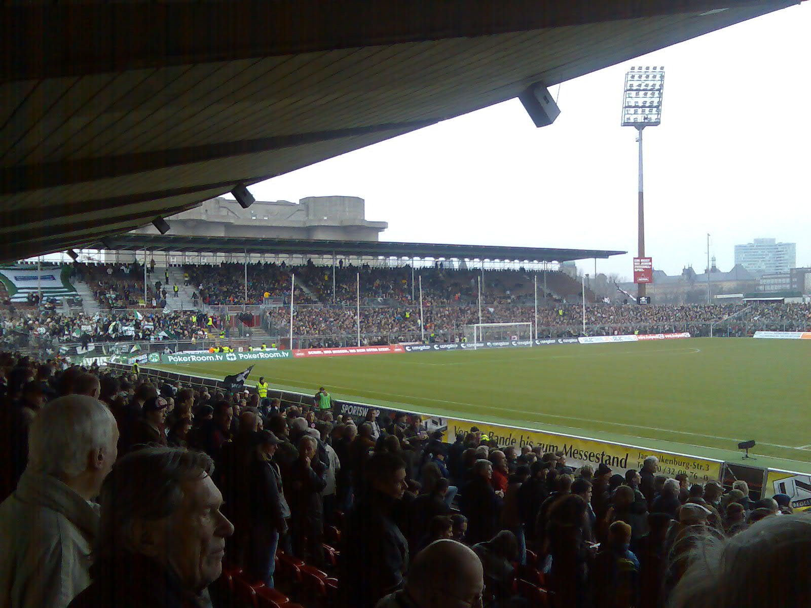 Provisorium über der Nordkurve - das Fassungsvermögen im Stadion wurde in der Rückrunde der Saison 2007/08 durch eine Stahlrohrkonstruktion weiter aufgetsockt.